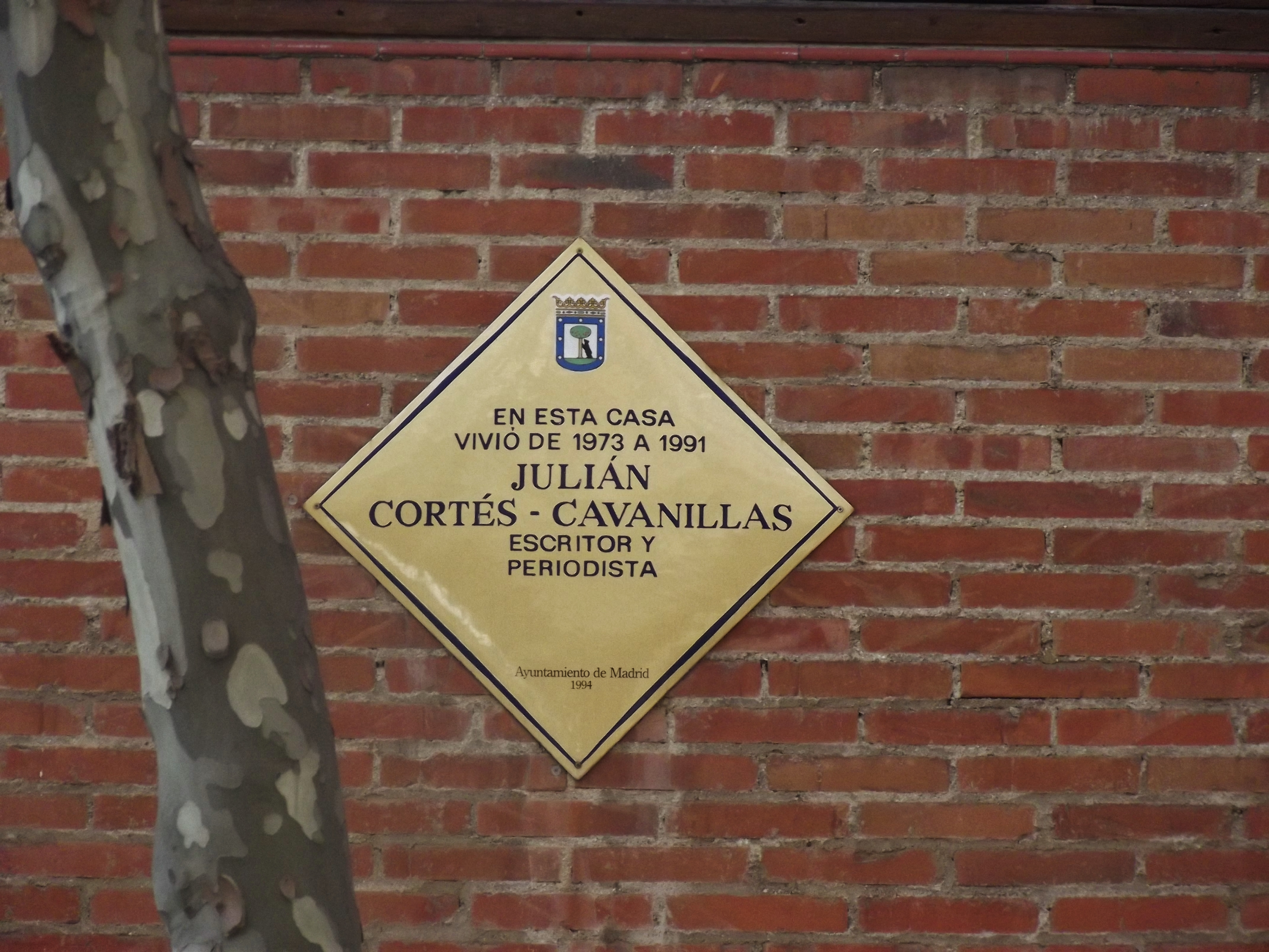 Placa dedicada a Julián Cortés Cavanillas.